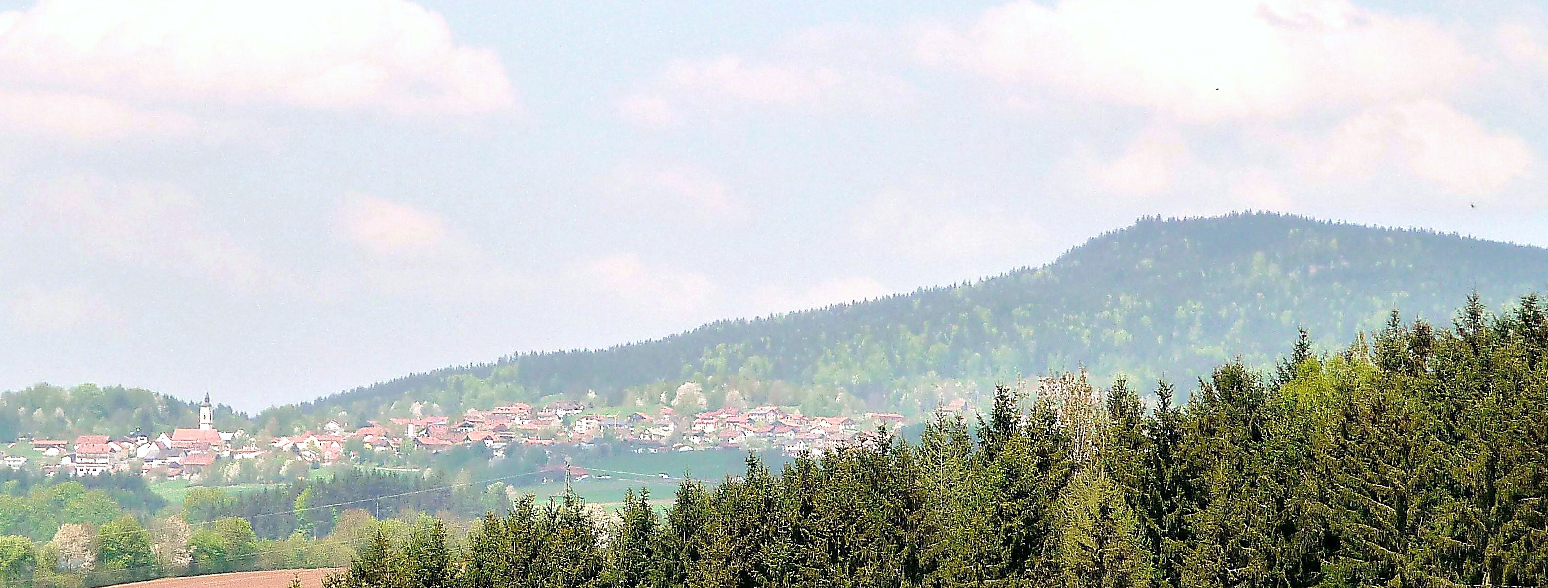 Blick zum Gsengetstein, links Kirchdorf im Wald